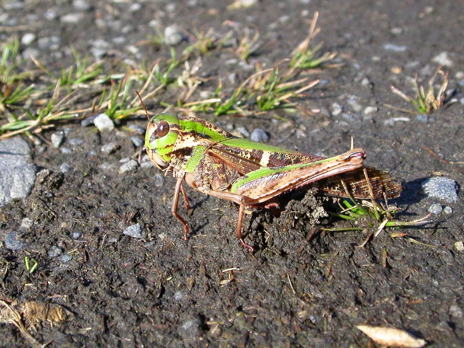 Gastrimargus marmoratus